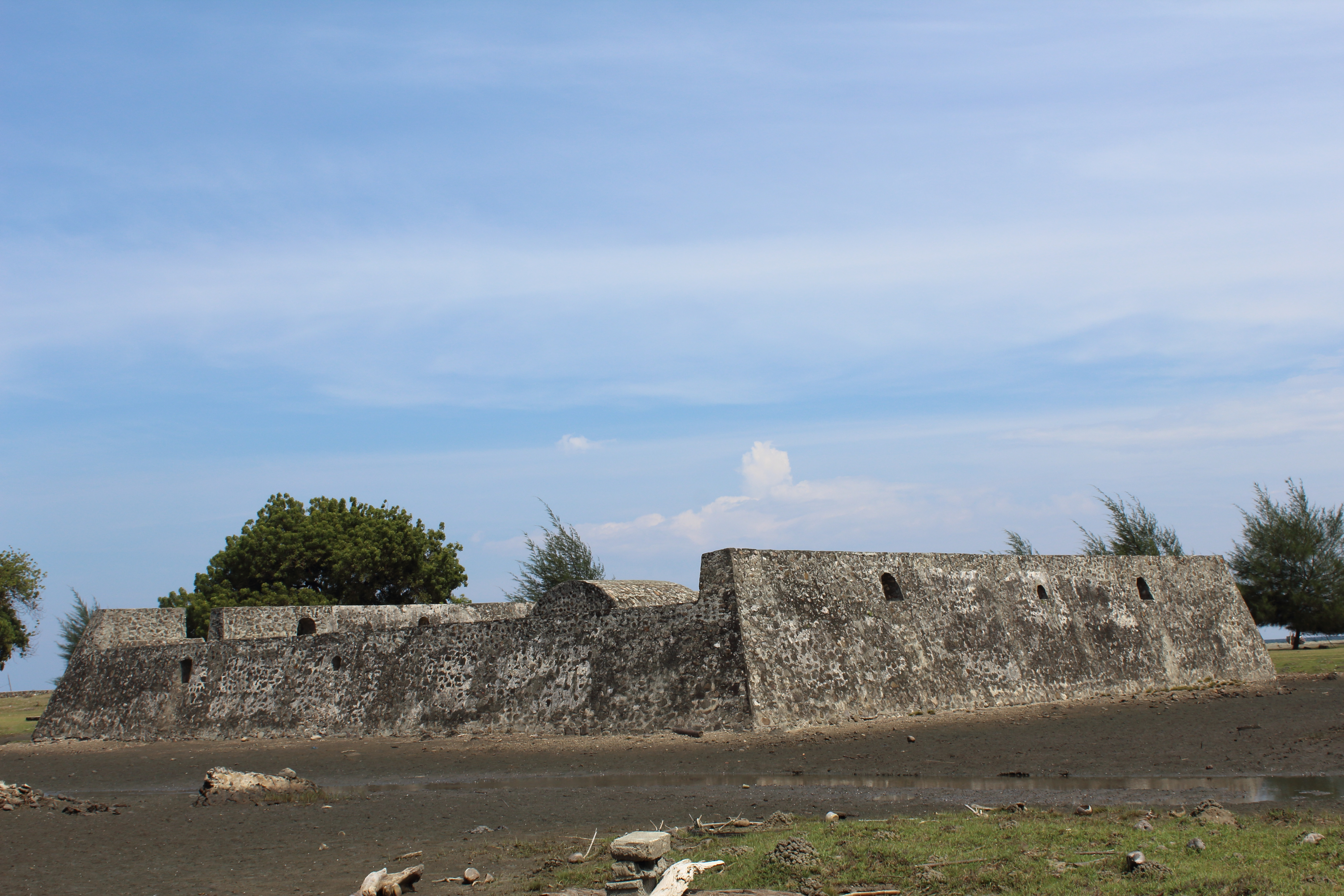 Benteng Indra Patra, Aceh Besar